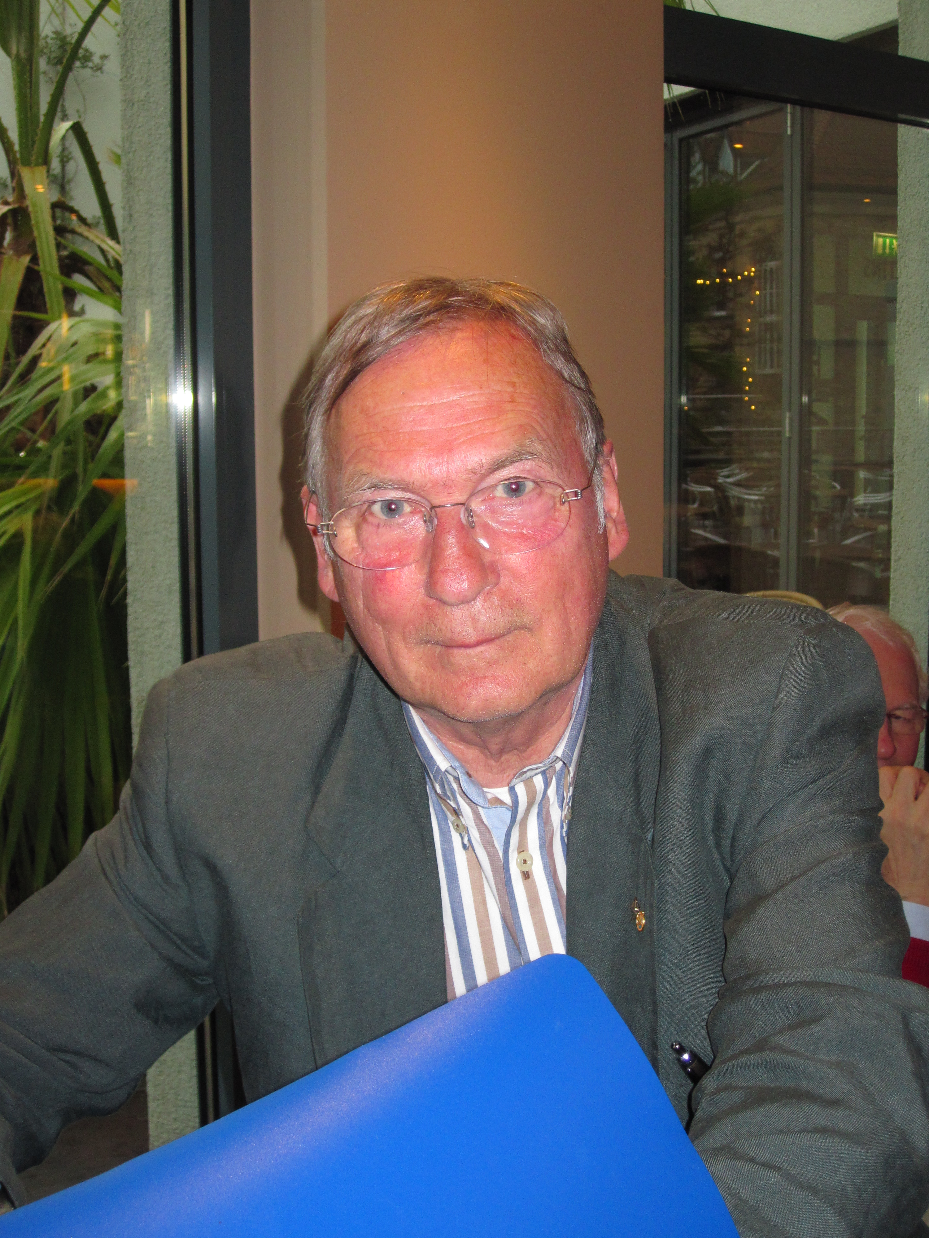 Der deutsche Autor Jochen Missfeldt bei einer Lesung in Osnabrück im November 2012.